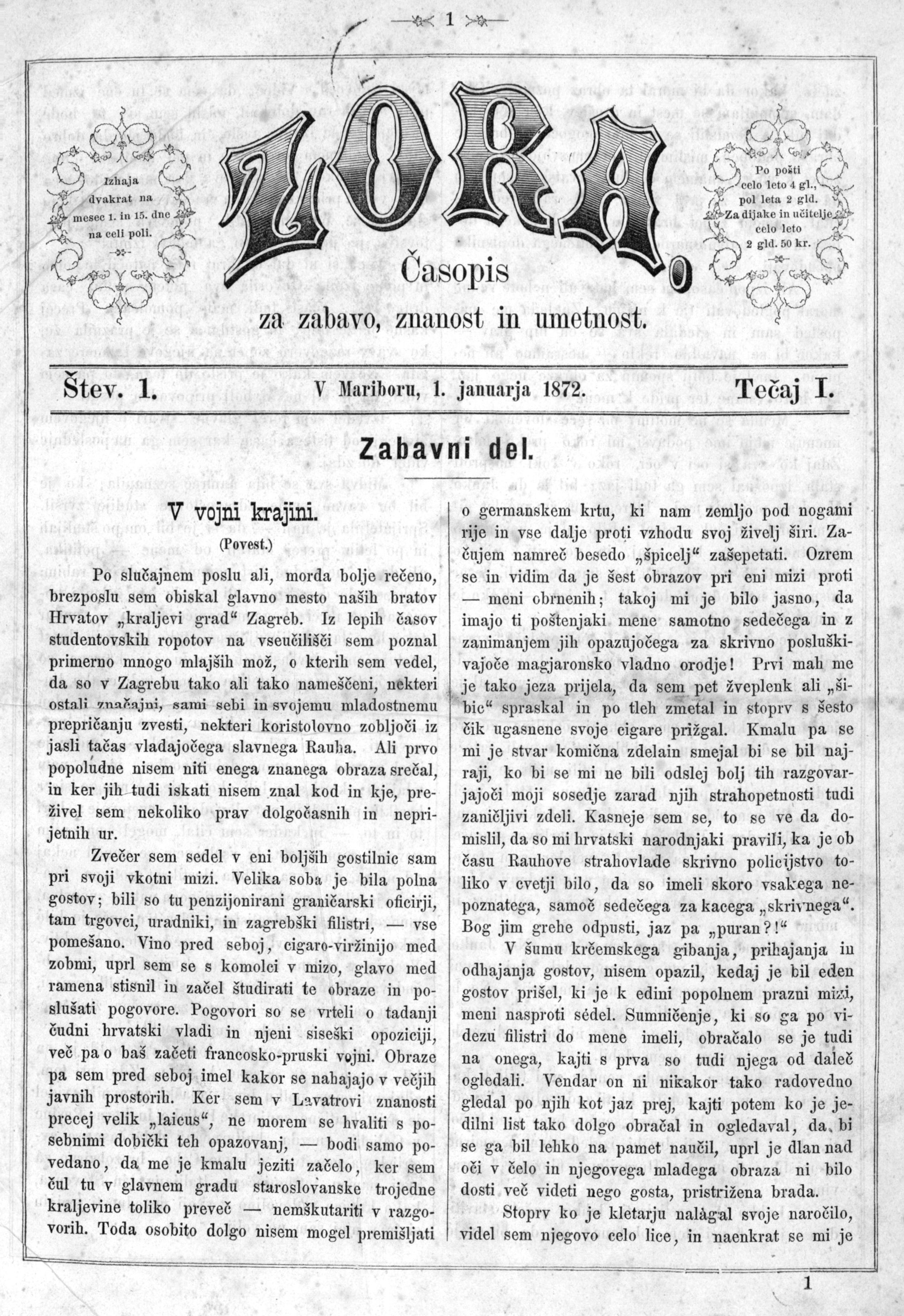 Zora, številka 1